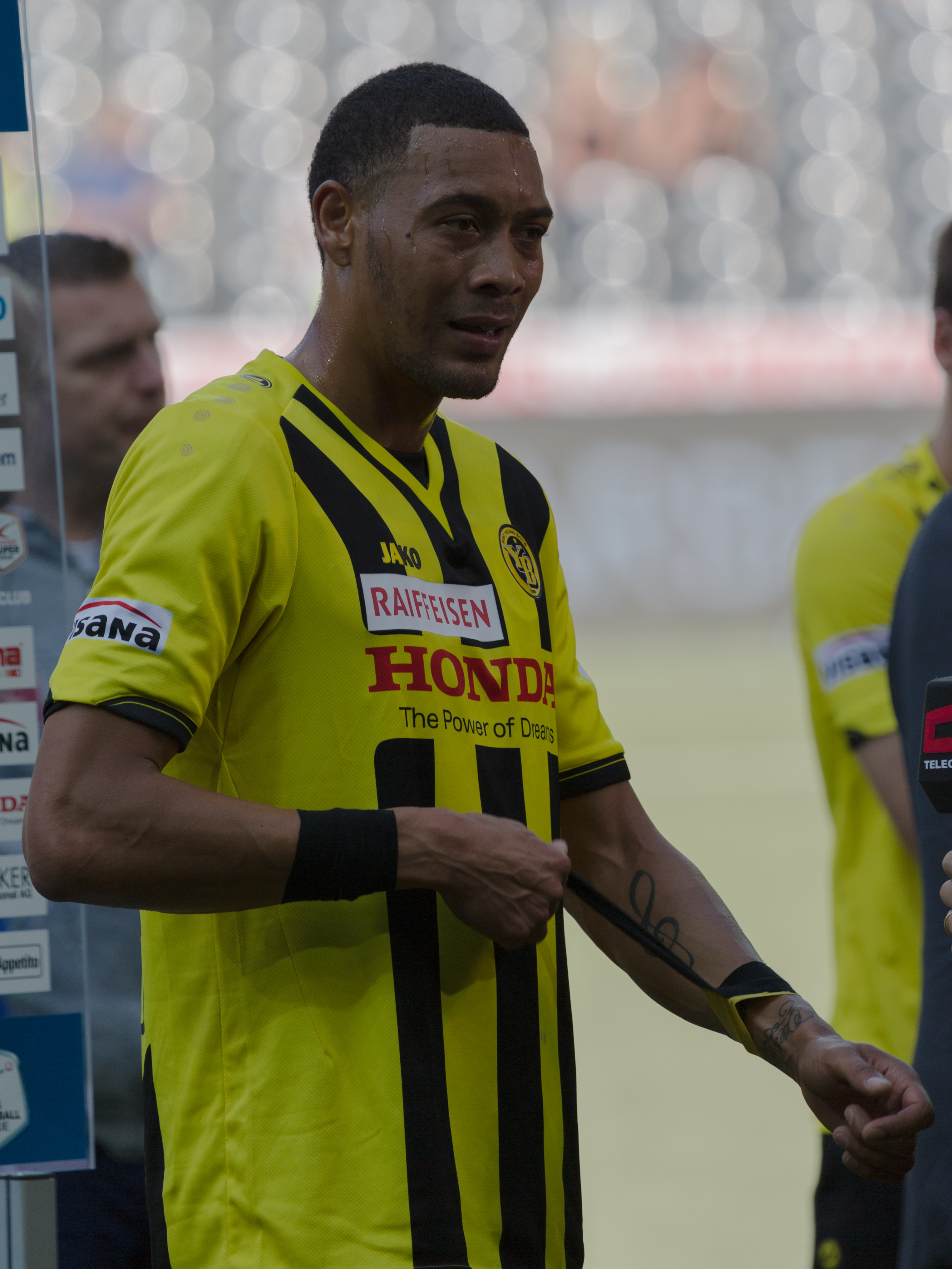 Guillaume Hoarau nach dem Spiel des BSC Young Boys gegen den FC Luzern